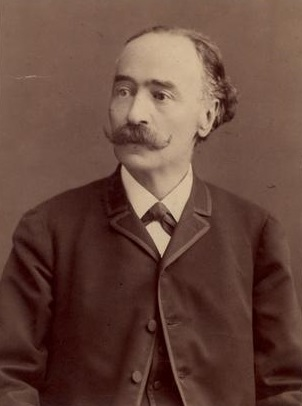 Kamermayer Károly az egyesített főváros polgármestere